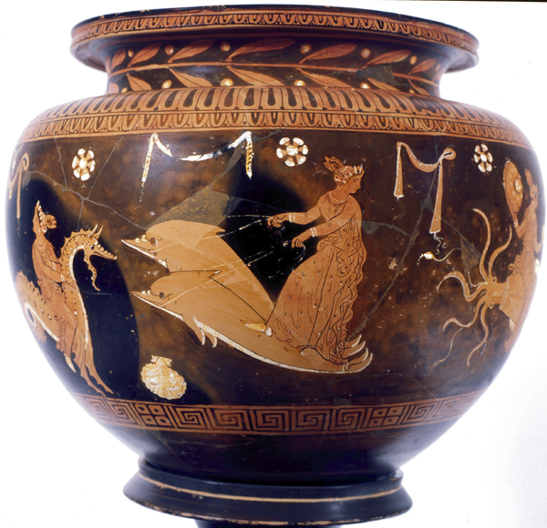 Dinos de Tetis y Peleo (Cultura Griega). Número de inventario: 2001-89-2.